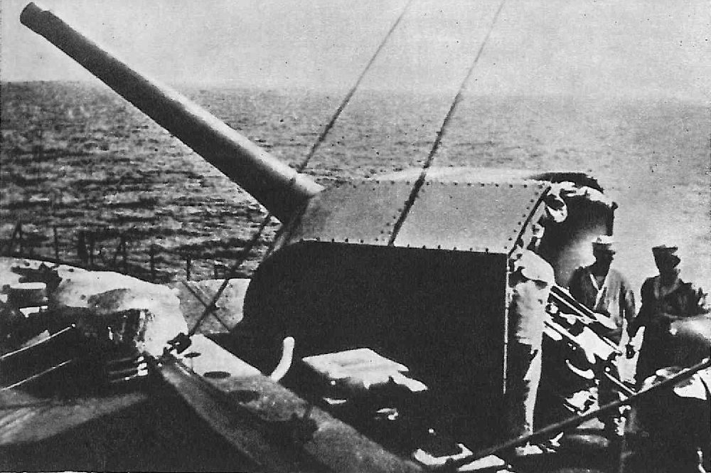 Działo kal. 130 mm na niszczycielu ORP "Wicher".